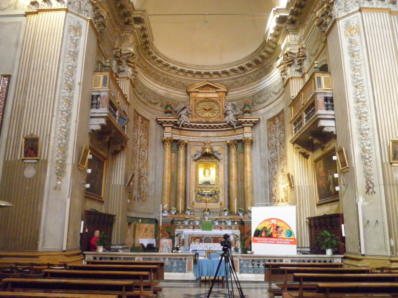 Roma, S. Maria del Pianto. Abside e altar maggiore